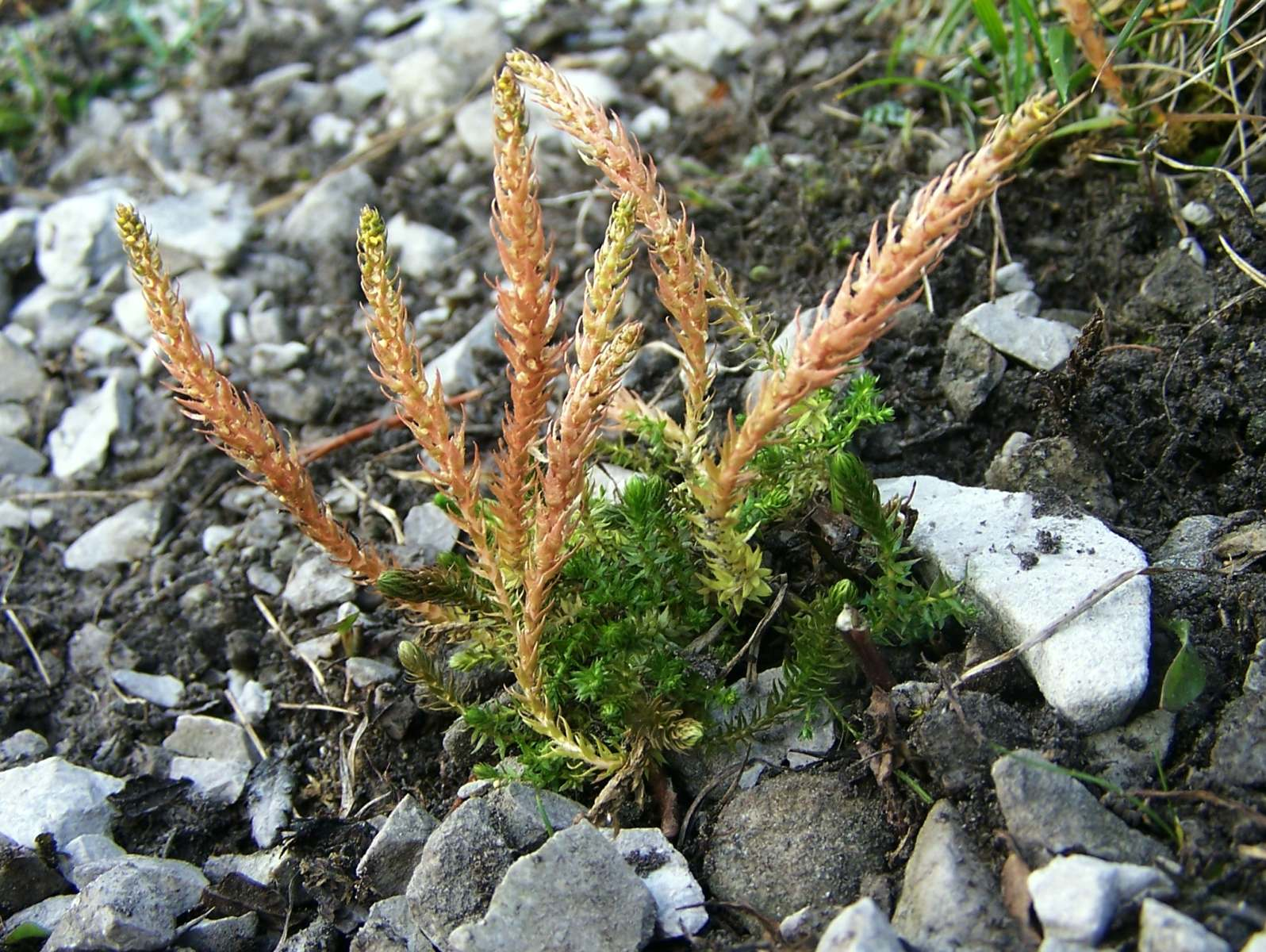 Selaginella selaginoides (pl. Widliczka ostrozębna), habitat: Tatra Mountains, Królowa Rówień)